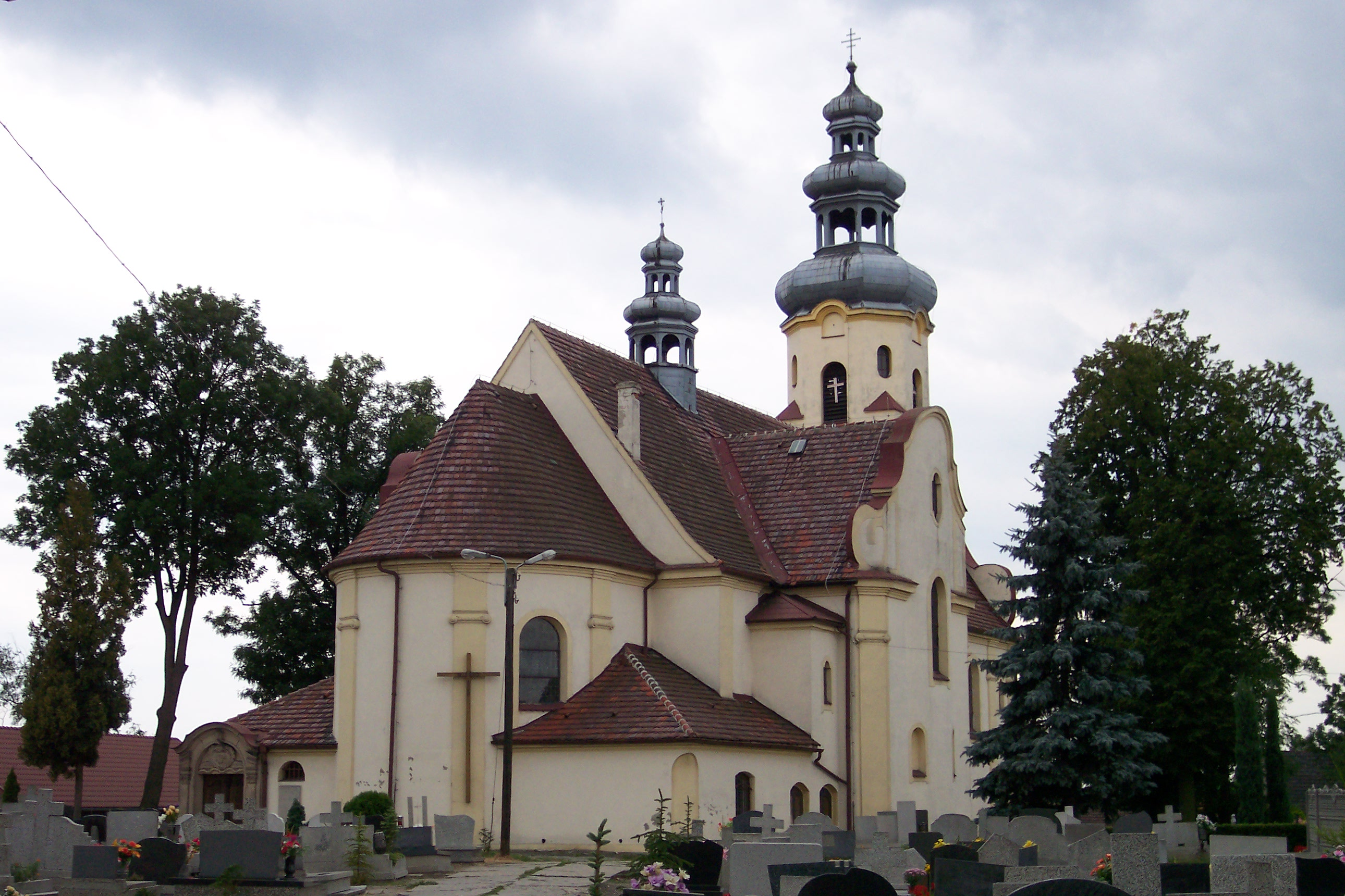 Kościół św. Mikołaja Biskupa Dobroci w Rudnie